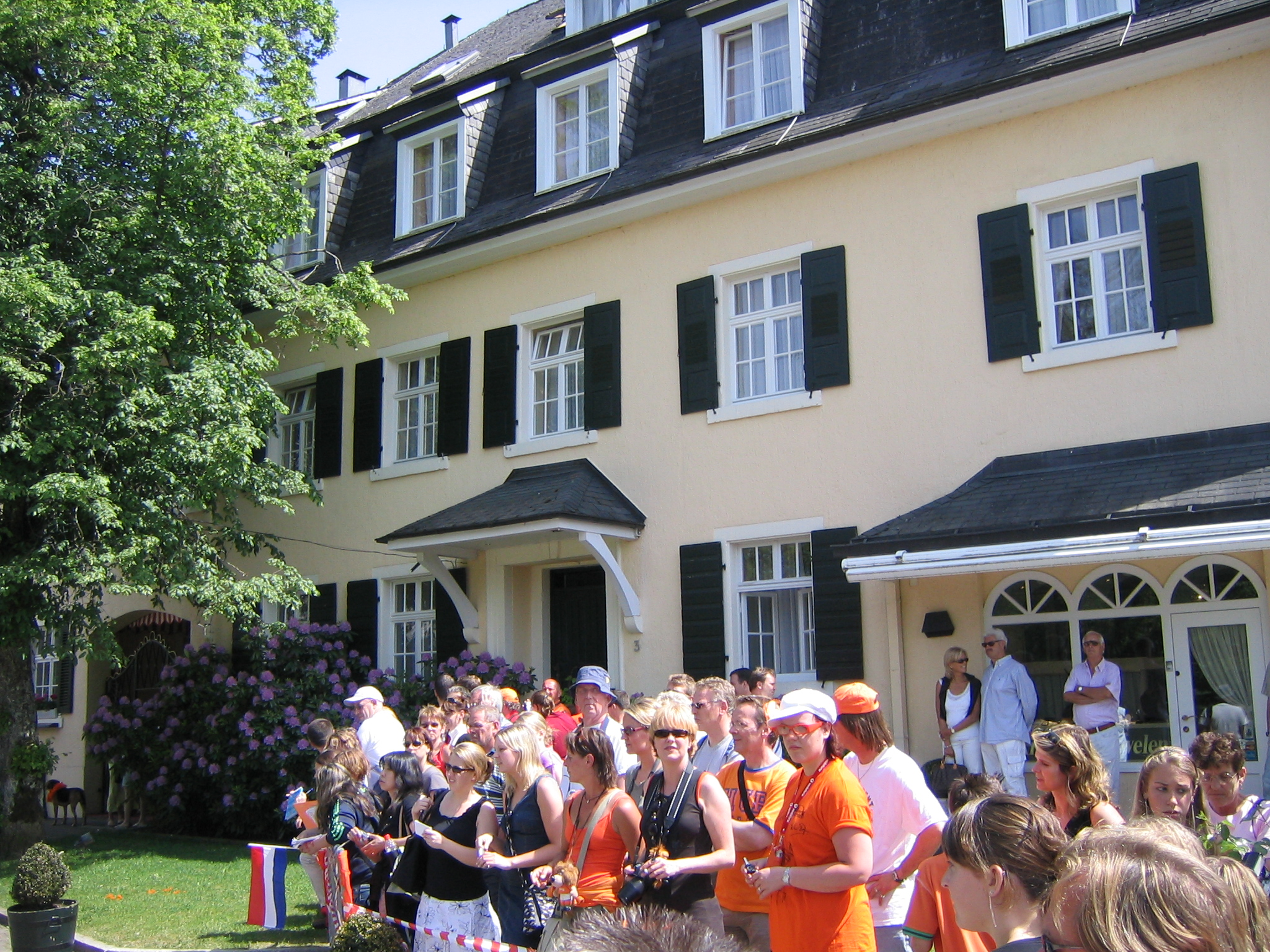 Fans der holländischen Fußballnationalmannschaft vor dem Hotel Adler in Hinterzarten